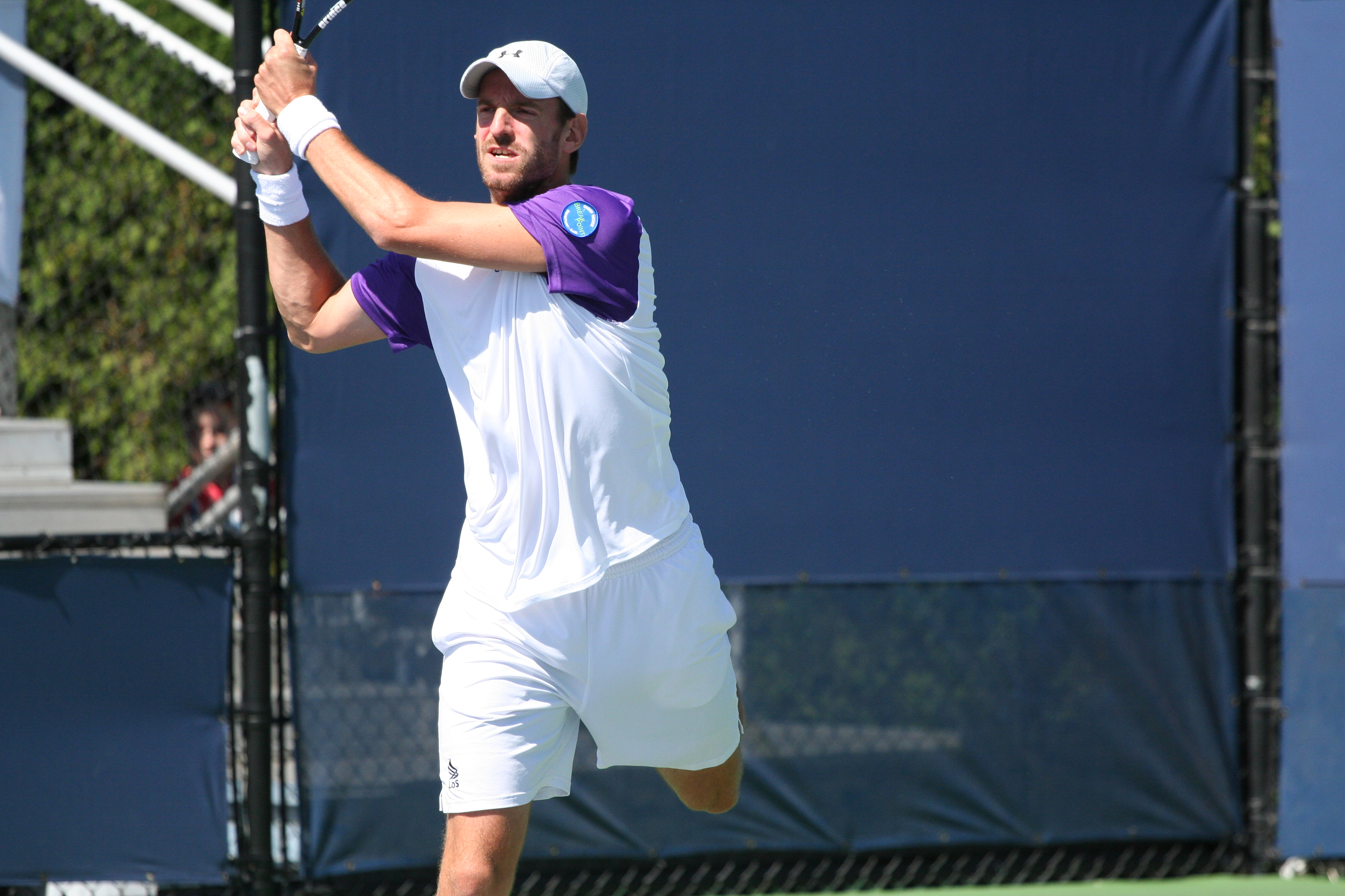 U.S. Open Sept. 4, 2010